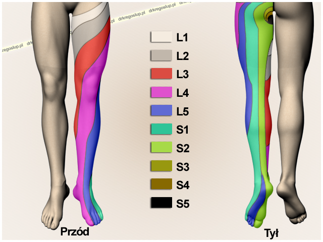 Ilustracja pokazująca dermatomy w kończynach dolnych, wykorzystana w portalu drkregoslup.pl, umieszczona w wiki commons przez autora